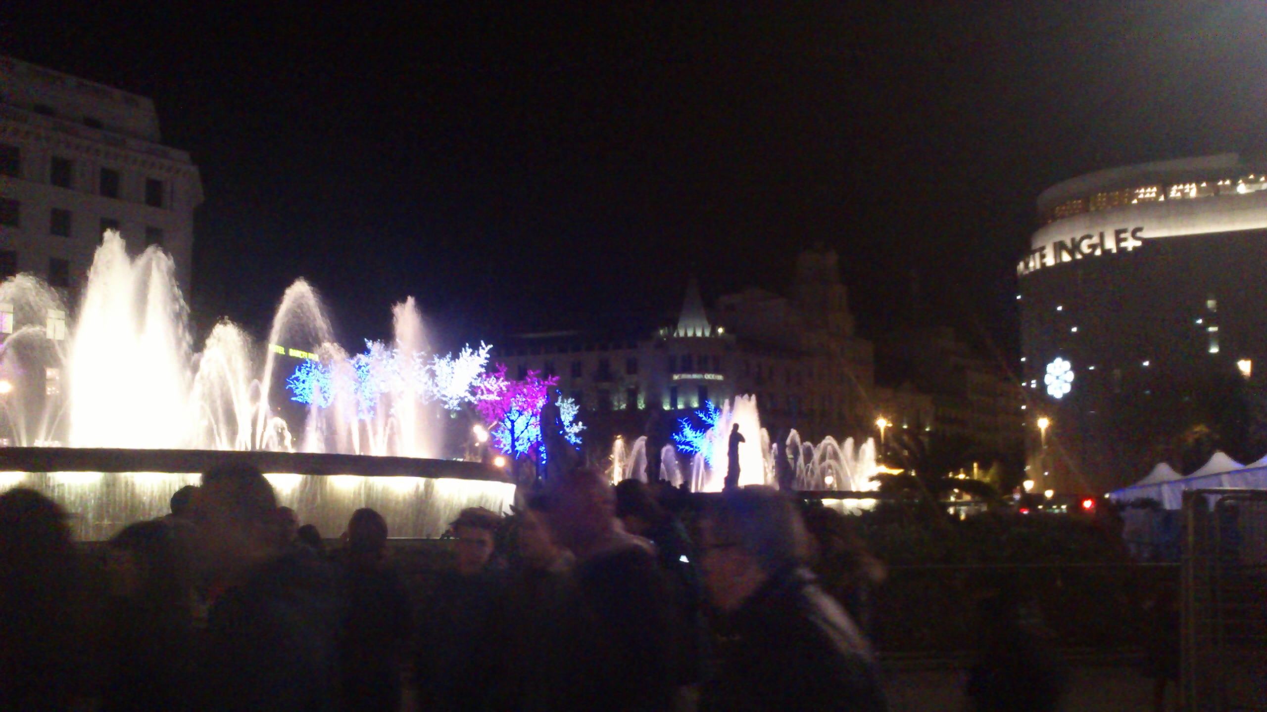 Imagen de Plaza Catalunya en Navidad de 2013.